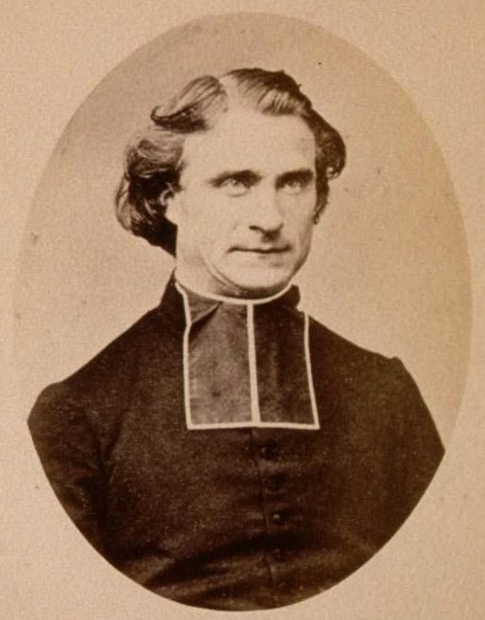 Photo de l'abbé Guthlin Aloyse, prêtre catholique